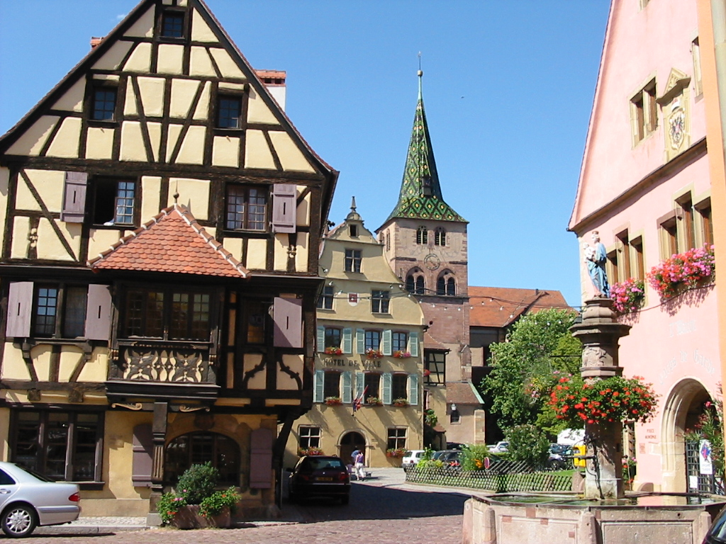 maison à colombage, hôtel de ville & église à Turckheim (Haut-Rhin)